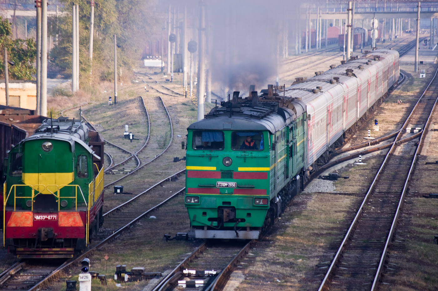 Локомотив 2ТЭ10М-2650 (поезд: Москва-Кишинёв) и маневровый тепловоз ЧМЭ3-6771 на станции Тирасполь